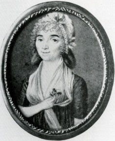 Charlotte Albertine Marat (1760-1841), sorella di Jean-Paul